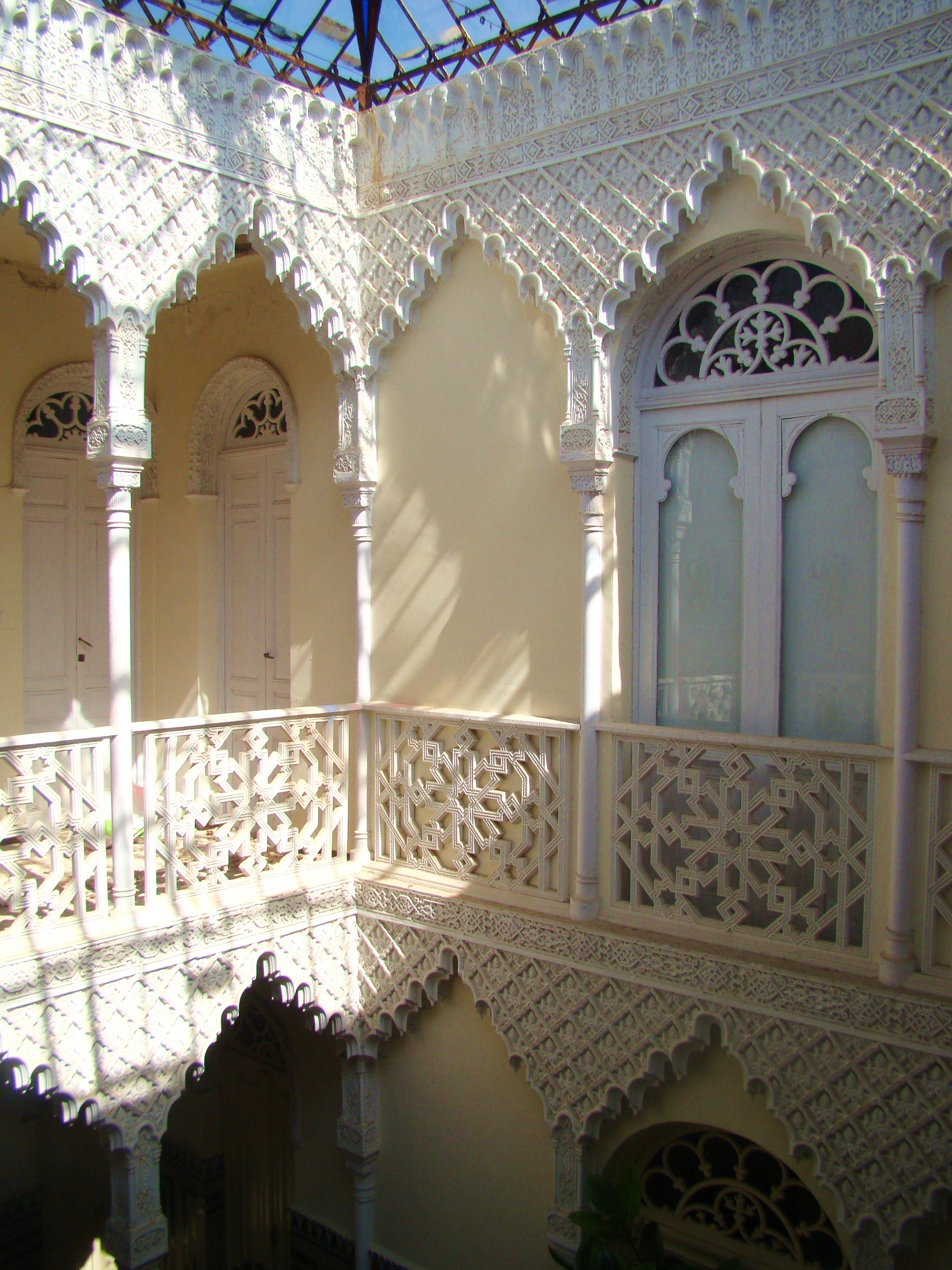 Patio de la Casa de Luis Peche